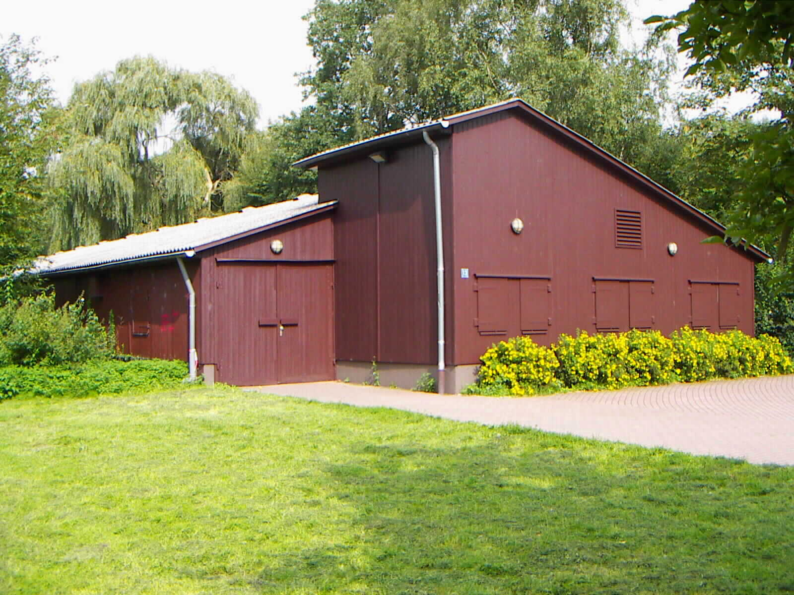 Geflügelstall der ehemaligen LVAUnna-Königsborn